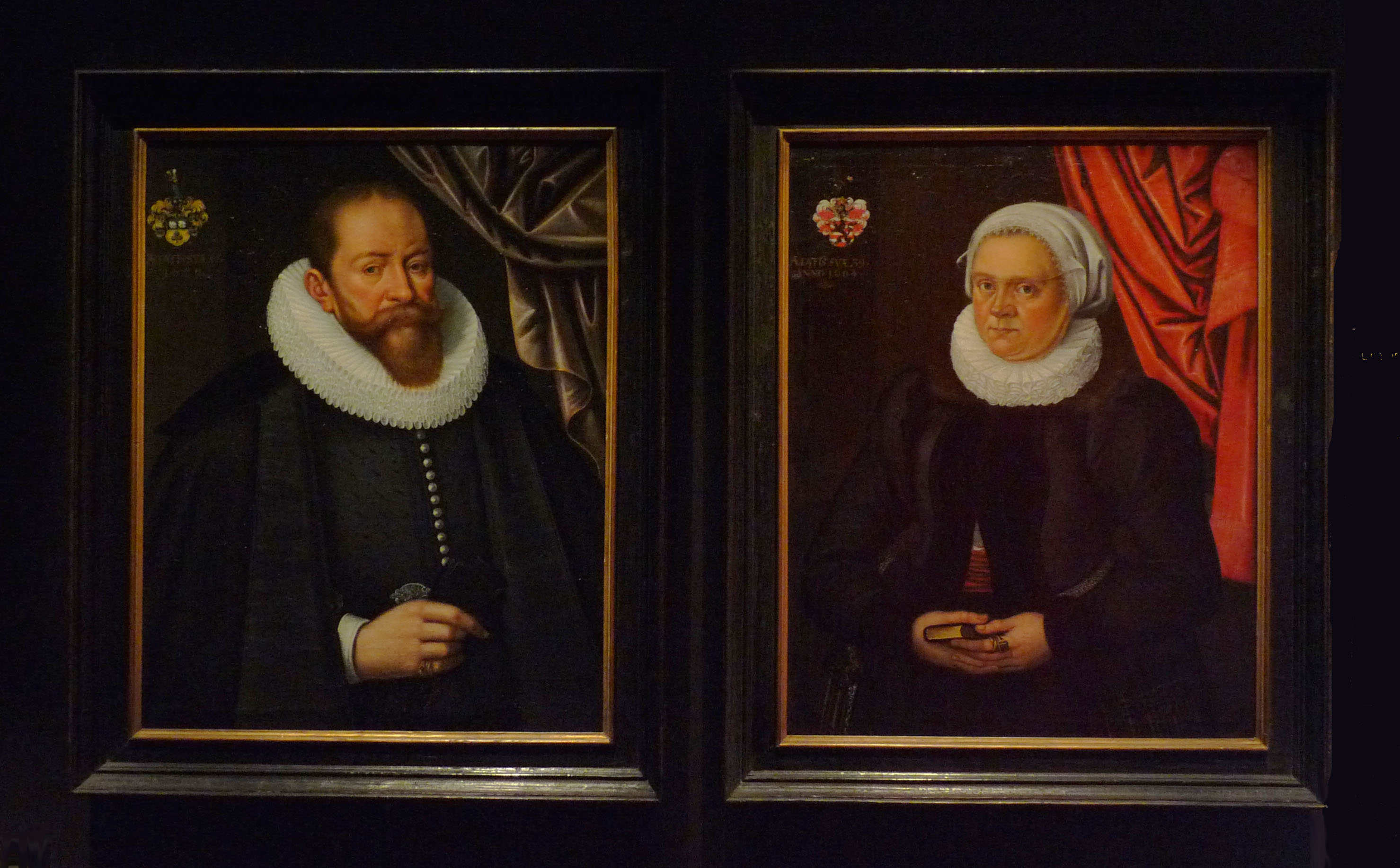 A gauche : l'Ammeister de Strasbourg, Carl Spielmann (1564-1631), 1629. Drapier et Ammeister en 1625 ; à droite : Anna Scheid, son épouse, 1604